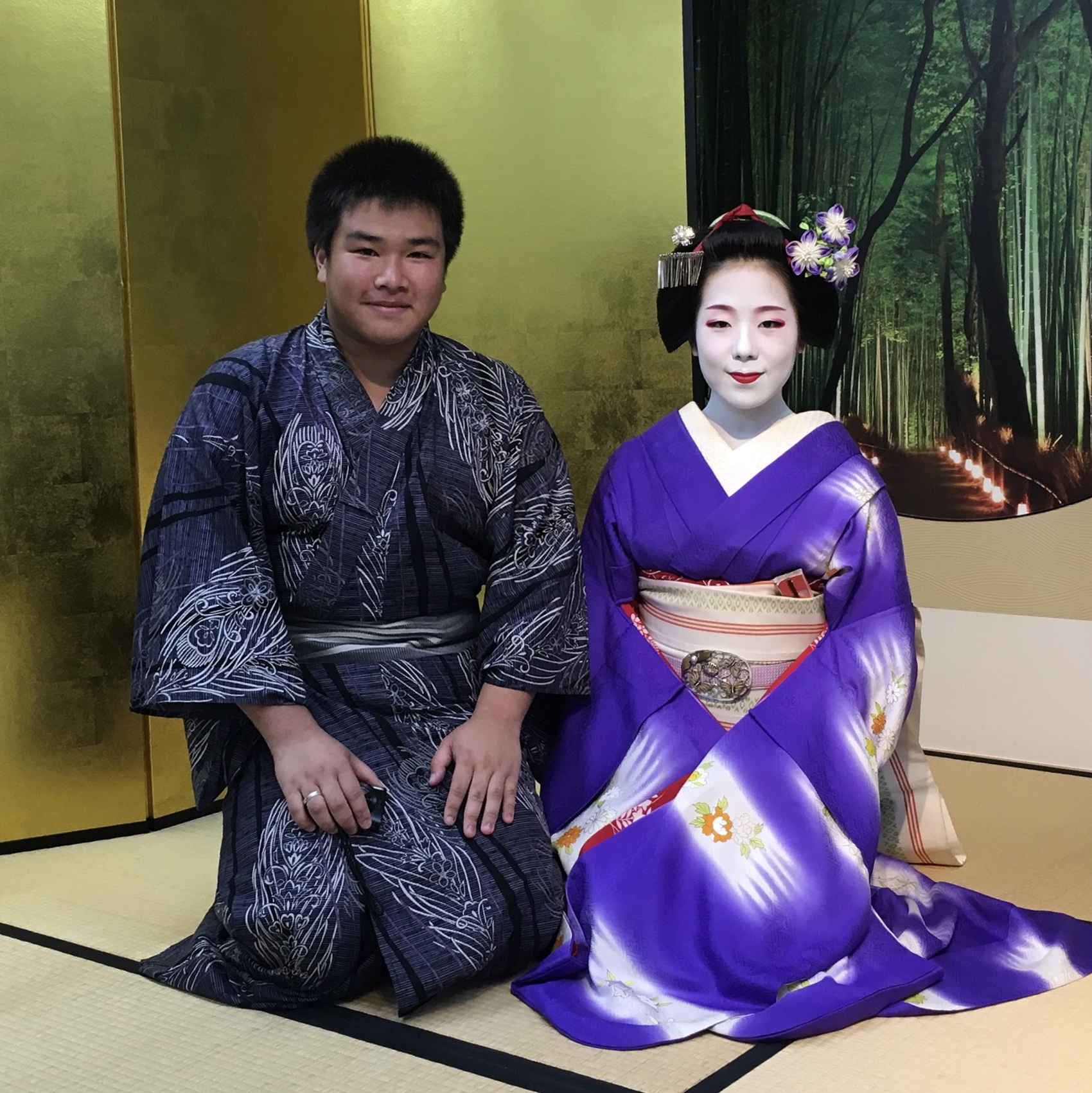 宮川町の舞妓叶子さん（右）、ともう一人はマカオの牧師梁君培さんです。